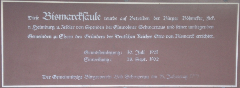 Informationstafel Bismarcksaeule Pariner Berg